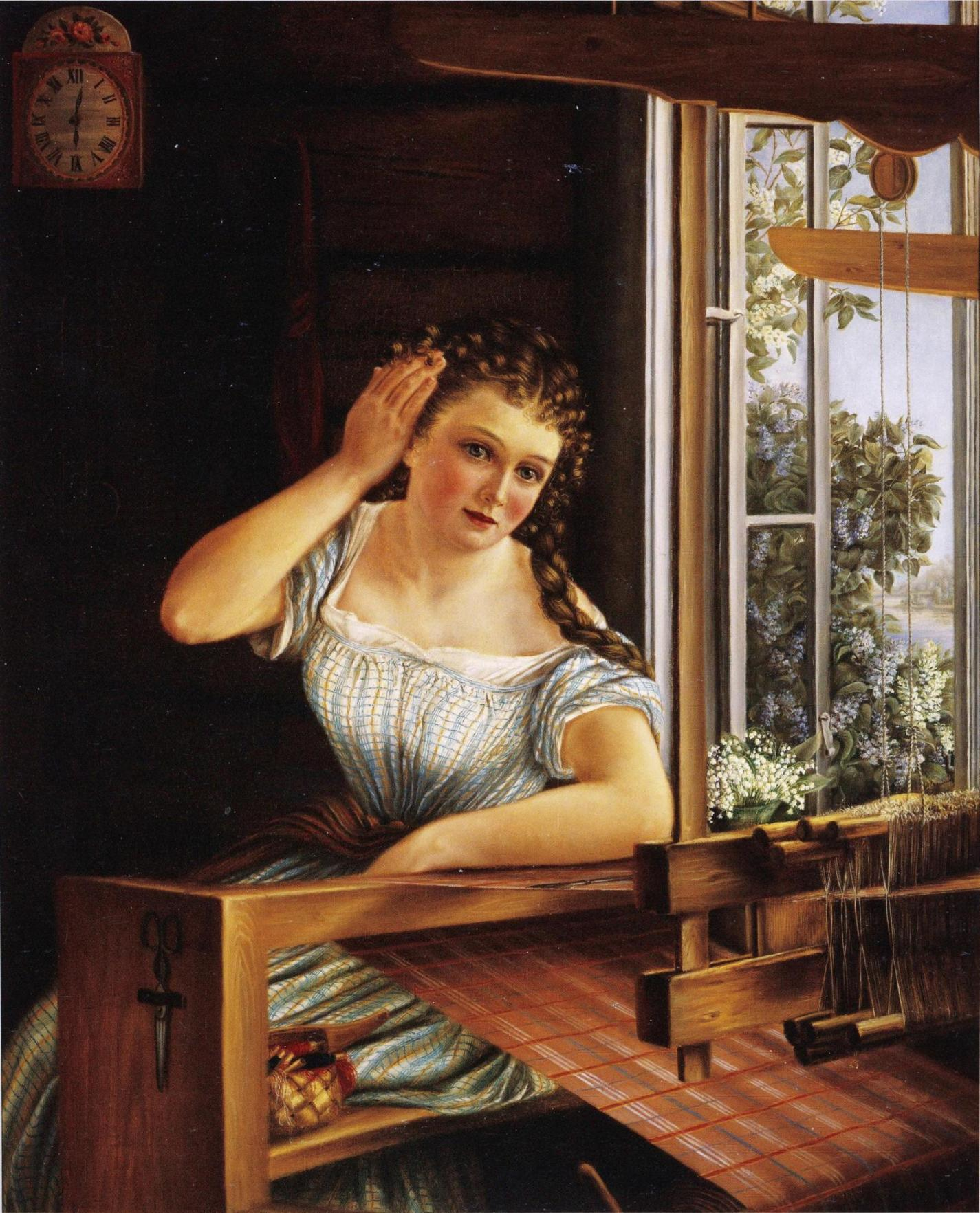 Elisabeth Blomqvistin maalaus Hanna perustuu Johan Ludvig Runebergin samannimiseen runoon. Teos kuuluu Ateneumin kokoelmiin.